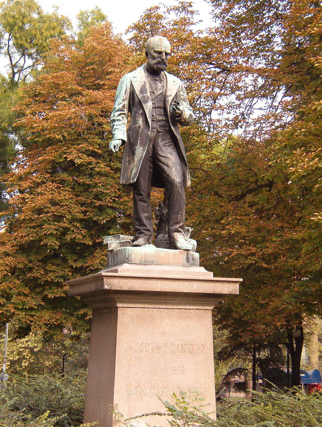 Јосиф Панчић, биолог. Fotografisao Goldfinger. U javnoj upotrebi!